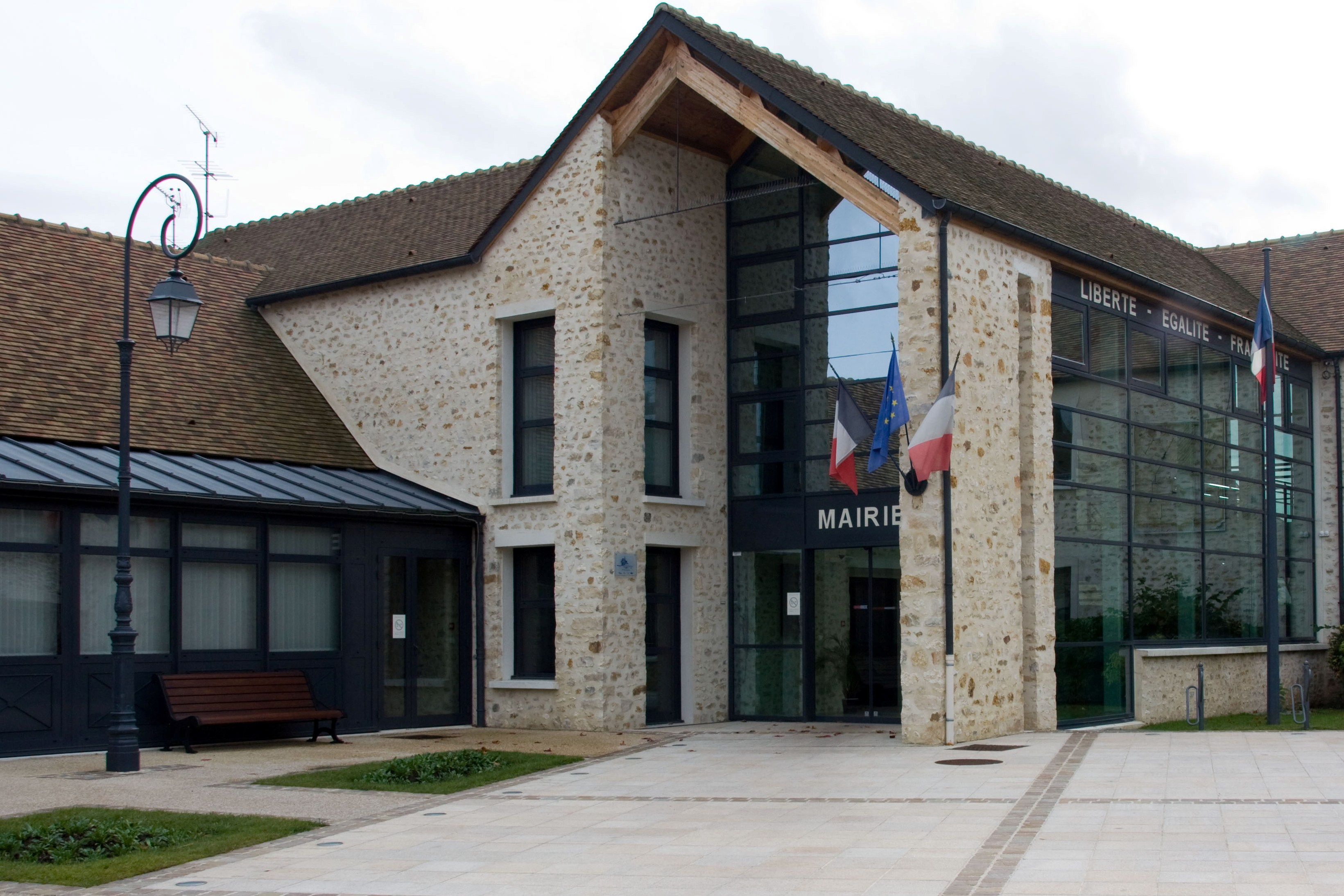 Mairie de Bondoufle, Bondoufle, Essonne, France